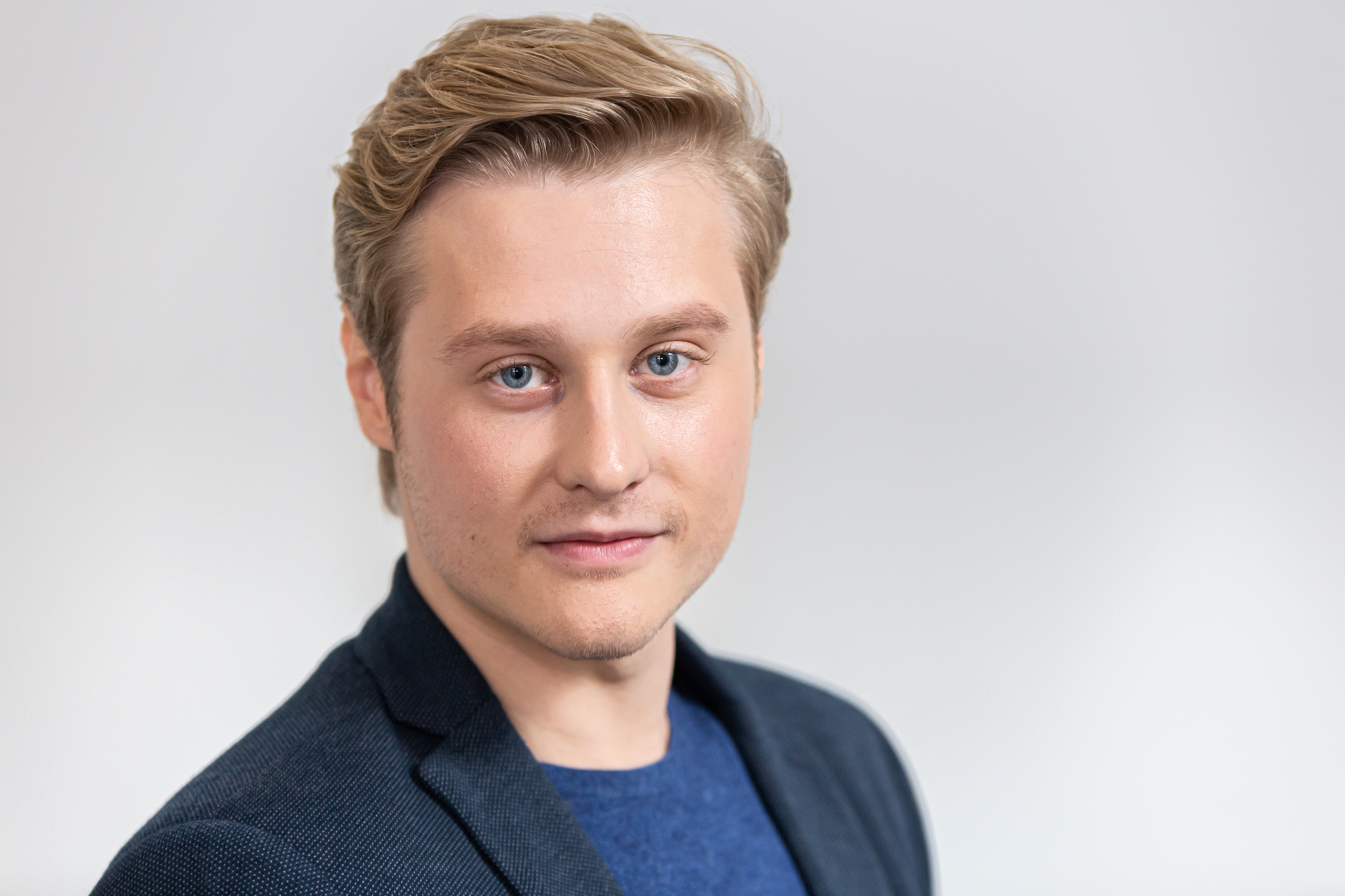 TV, ARD, Cast "Rote Rosen" Staffel 16; Julian Brodacz